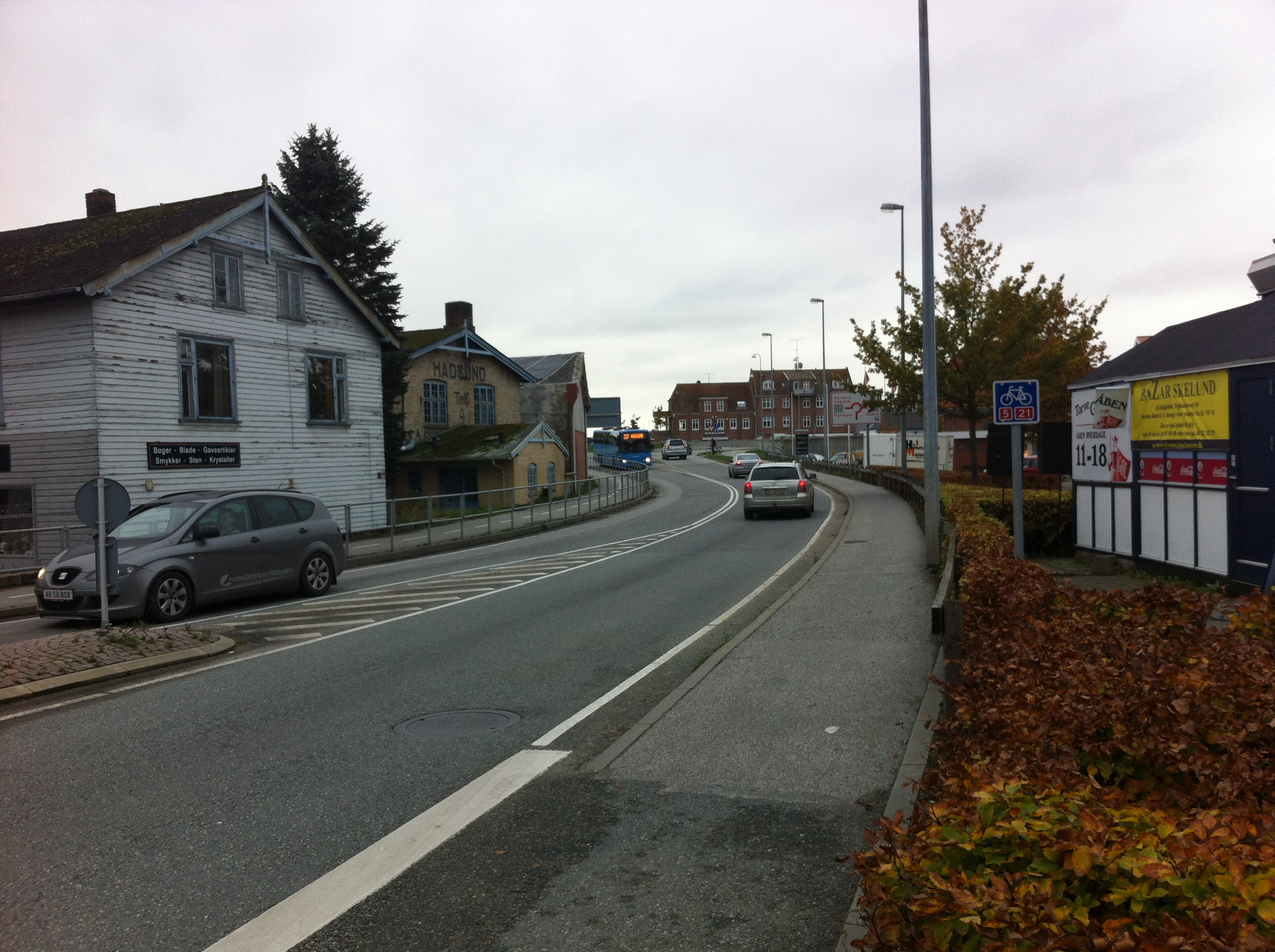 Hadsund Havnebane kørte i højre side af denne vej, i venstre side kørte Randers-Hadsund Jernbane. det grå og det gule hus i venstre side stod der også da banerne kørte der. Det grå hus kan man også se på billedet: HadsundHavnebane-1